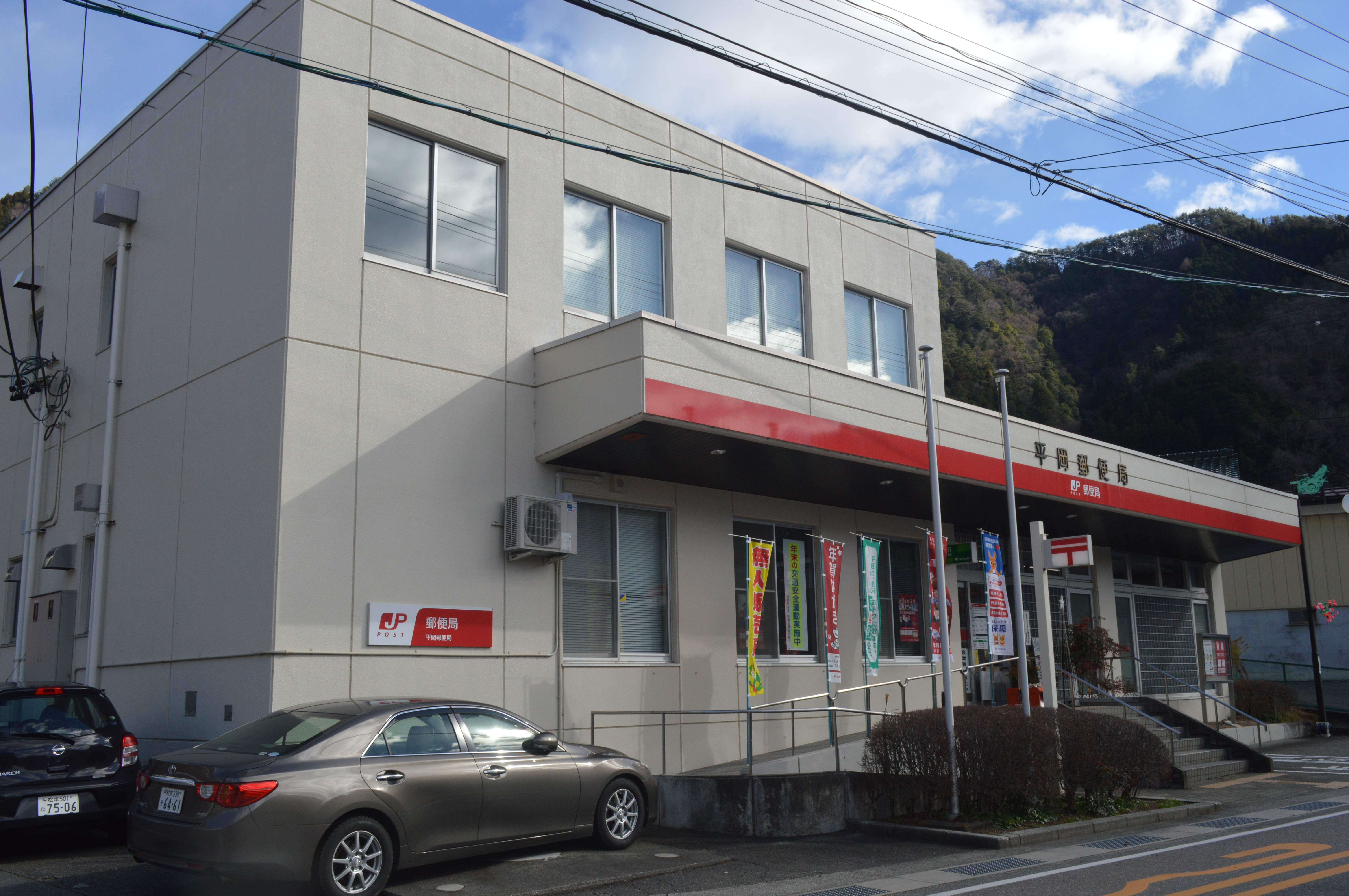 長野県下伊那郡天龍村の平岡郵便局。